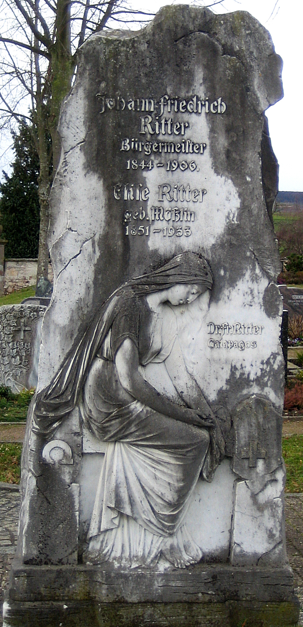 Grabstein der Eltern von Dr. Friedrich Ritter auf dem Friedhof von Wollbach (Kandern) mit einer Gedenkinschrift "Dr.Fr.Ritter Galapagos". Dr. Ritters Grab befindet sich auf der Insel Floreana